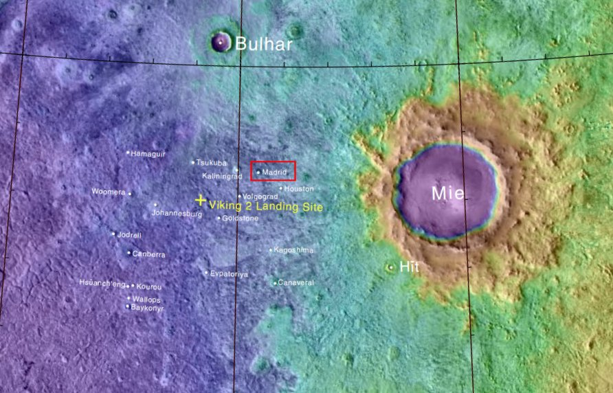 Cráter marciano Madrid. Localización (Imagen IAU/USGS/Goddard/A SU/USGS)